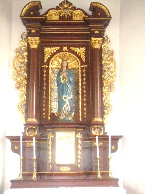 Kapelle Maria Schnee, Unterstadion, Alb-Donau-KreisAltar